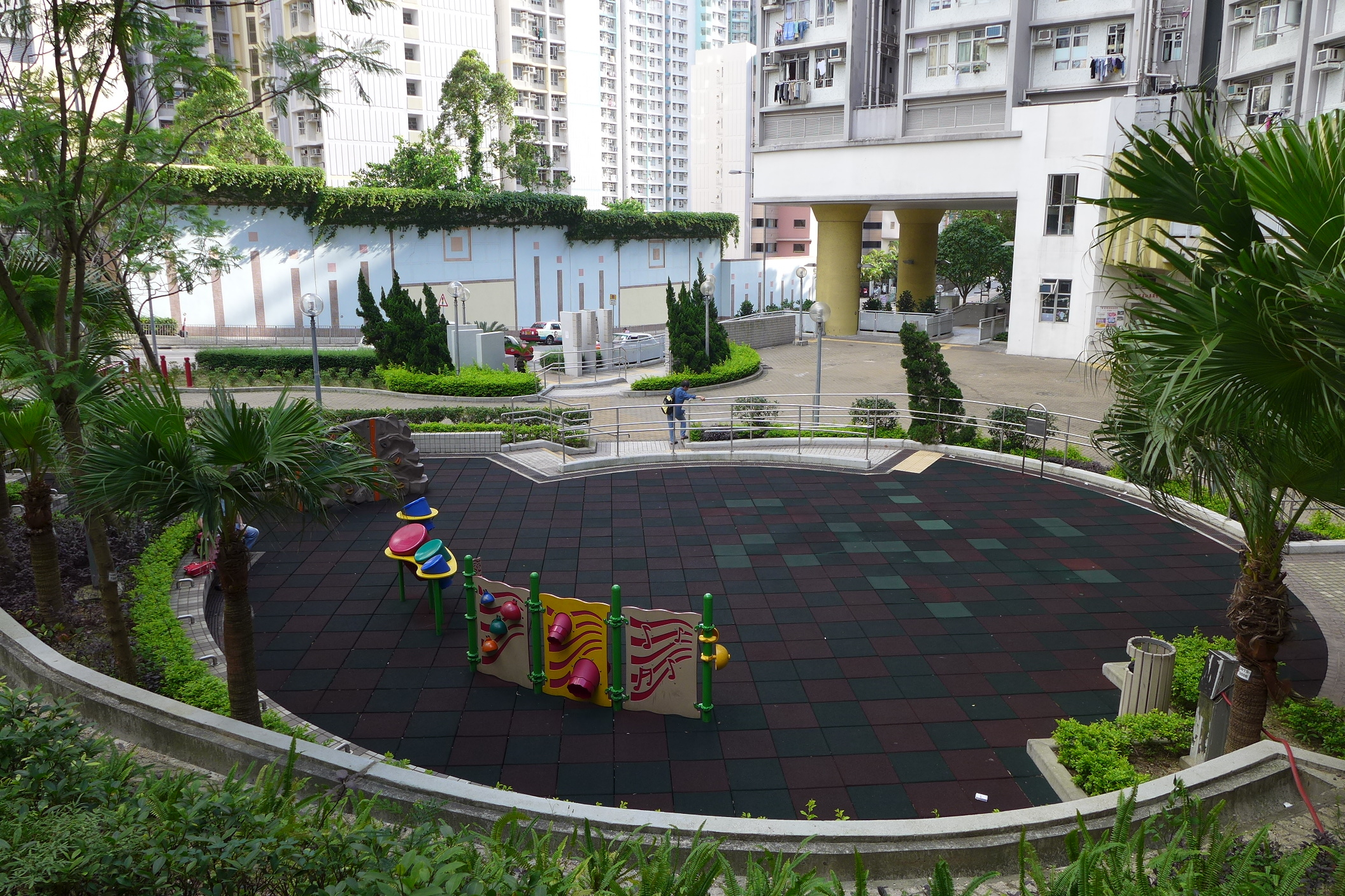 Upper Wong Tai Sin Estate Wing Sin House Garden view